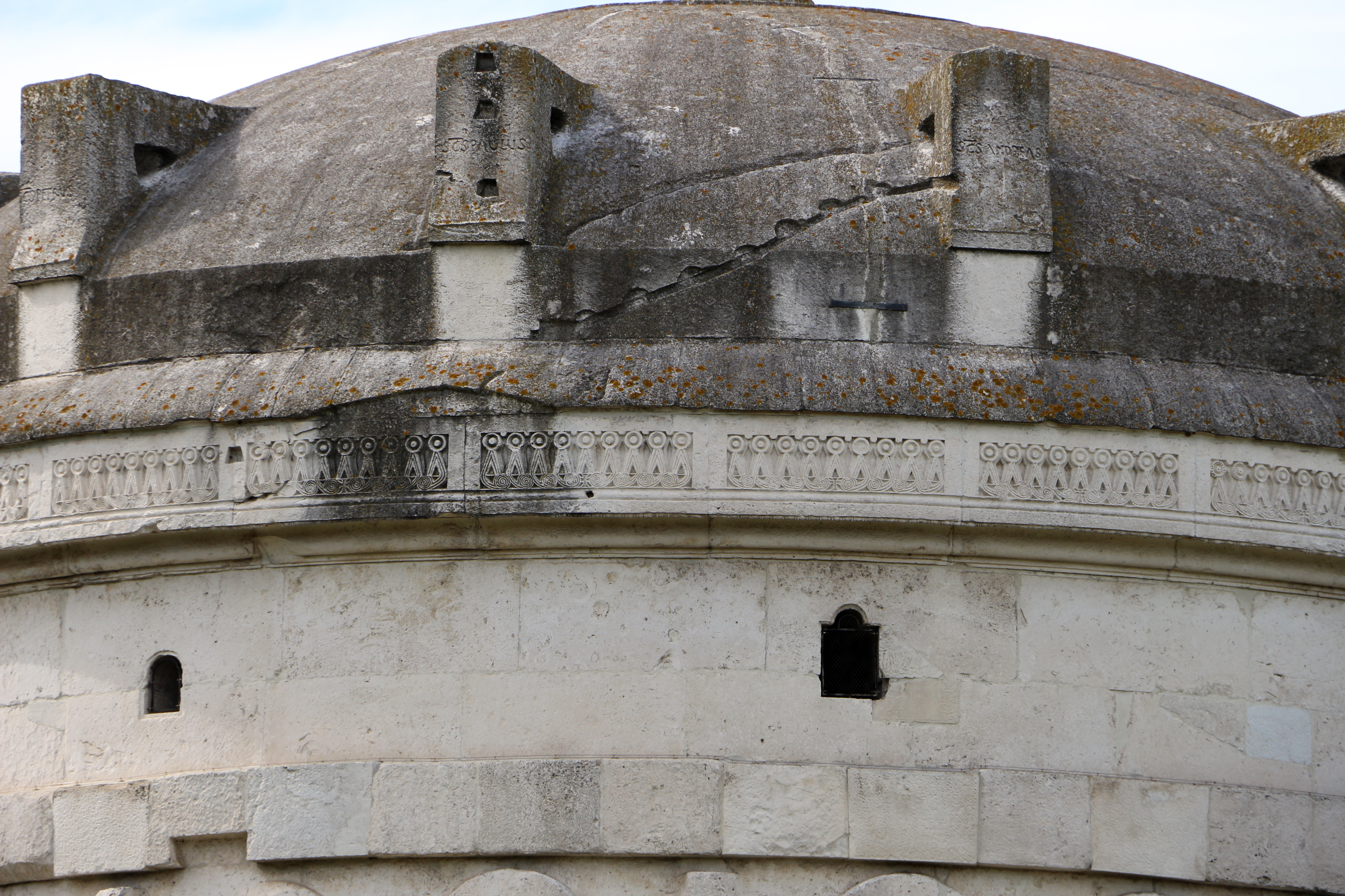 Mausoleo di Teodorico This is a photo of a monument which is part of cultural heritage of Italy.